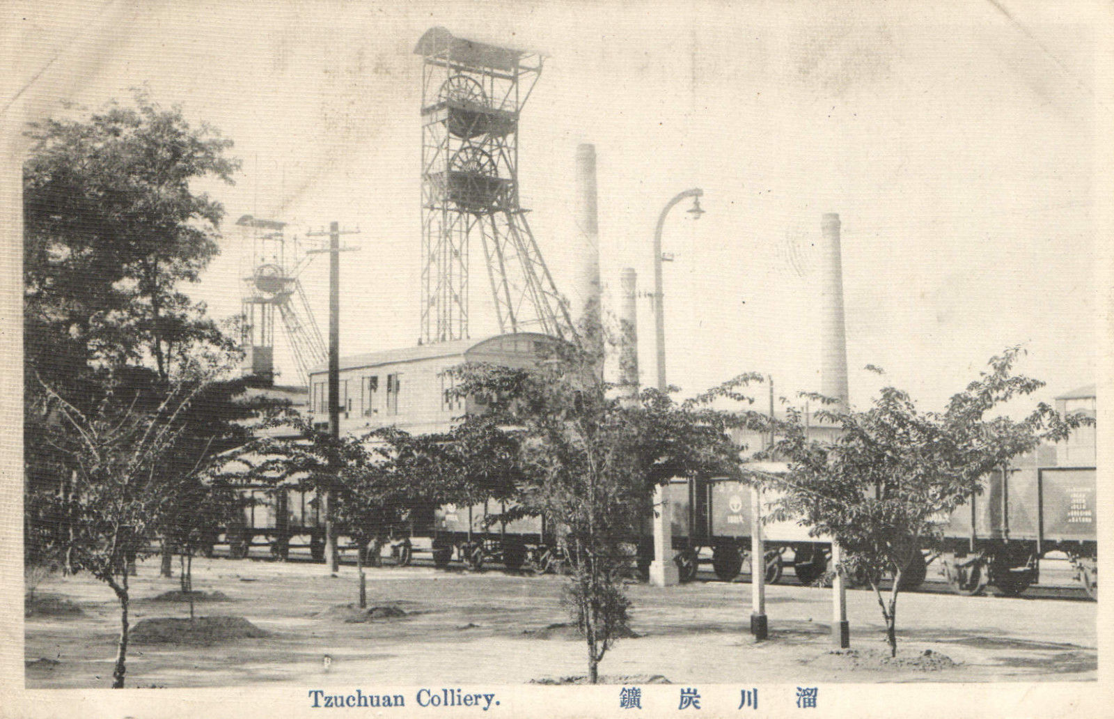 淄川黉山煤矿旧明信片